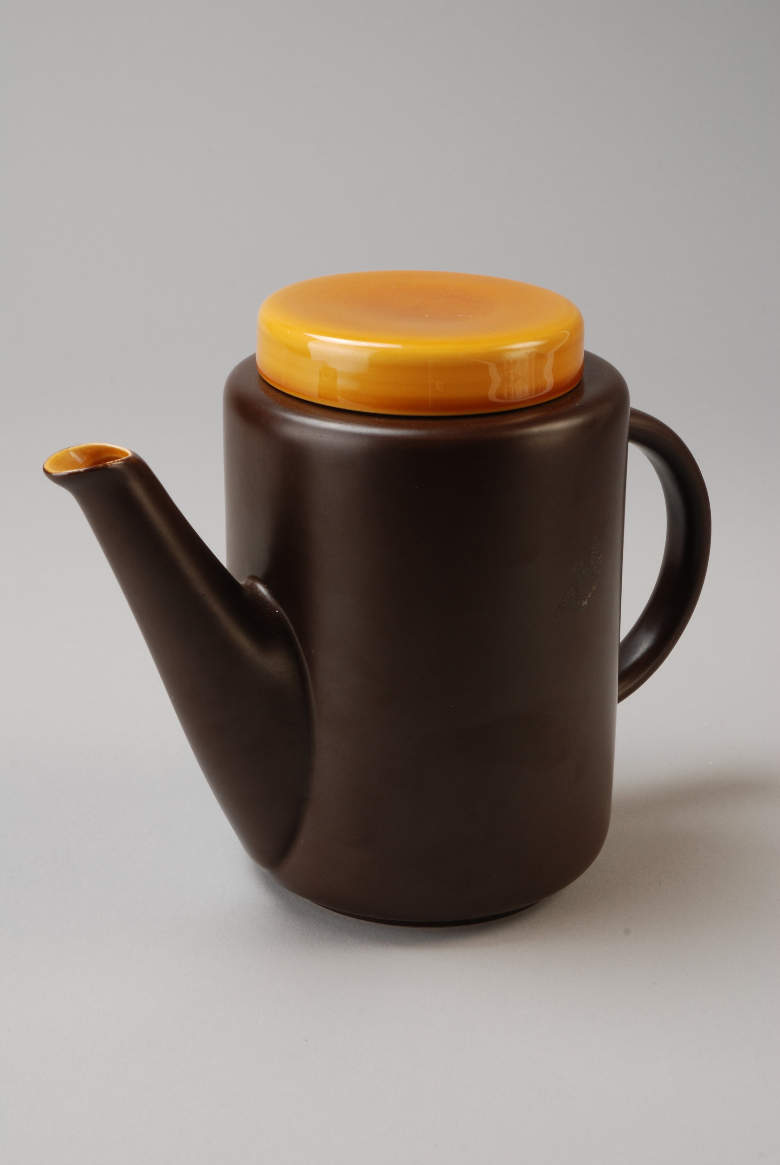 Objectgegevens Titel: Donkerbruine theepot (A) met geelbruine binnenkant en geelbruin deksel (B), model Utrecht Trefwoorden: theepot, vaatwerk, houder Opschrift / merk: A: onderop gemerkt met logo, opschriften "Made in Holland" en "Huizen", afbeelding van driehoek met pot erin. Verder op A restanten van een sticker (vermoedelijk ook met logo). Vervaardiger: Potterie De Driehoek Plaats vervaardiging: Nederland, Huizen Datering: 1962 - 1975 Materiaal: keramiek, aardewerk, glazuur Afmetingen: (cm) a: hg 13,8 / br 10,0 / lg 20,0 / b: hg 2,5 / dm 8,1 Associatie: servies Vorm & decoratie: logo, beeldmerk, drinkgerei Inventarisnr: Museum Rotterdam 88105-1.A-B